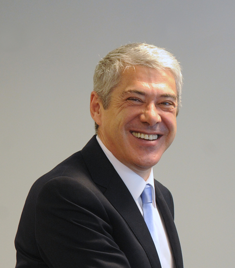 José Sócrates, au Palácio do Planalto (Brasília), le 2 janvier 2011.